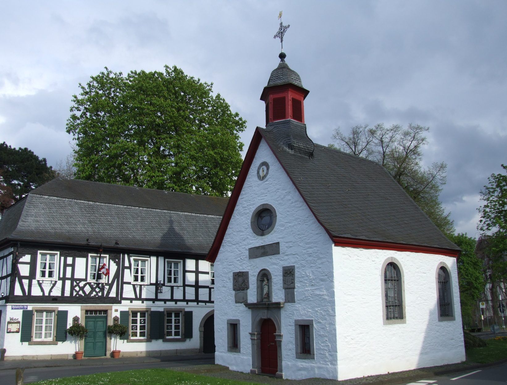 Marienkapelle in Rhöndorf, Bad Honnef